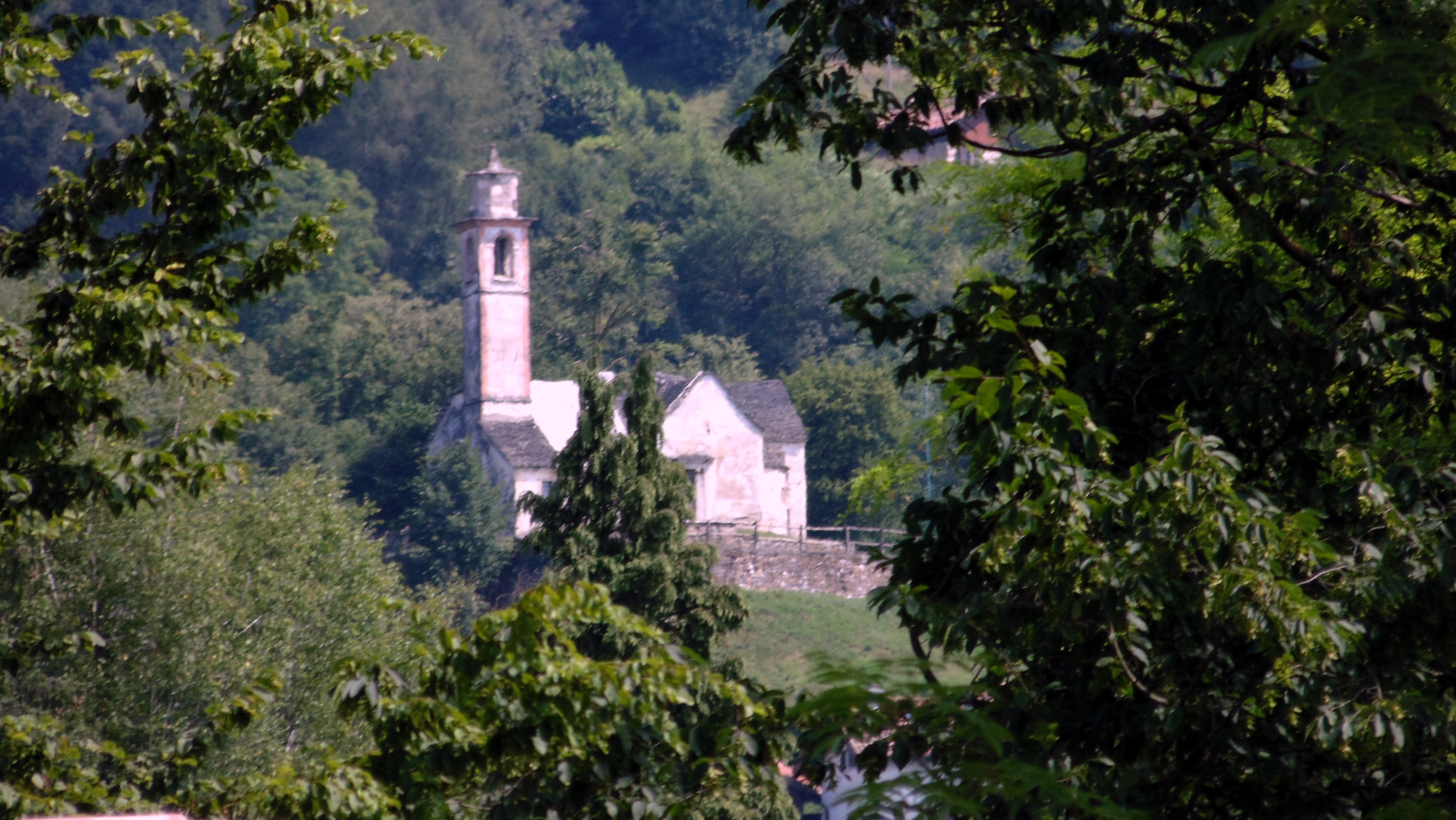 vista della chiesetta da Col Fiorito